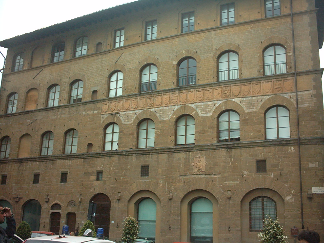 Veduta del Tribunale di Mercatanzia da Piazza della Signoria a Firenze